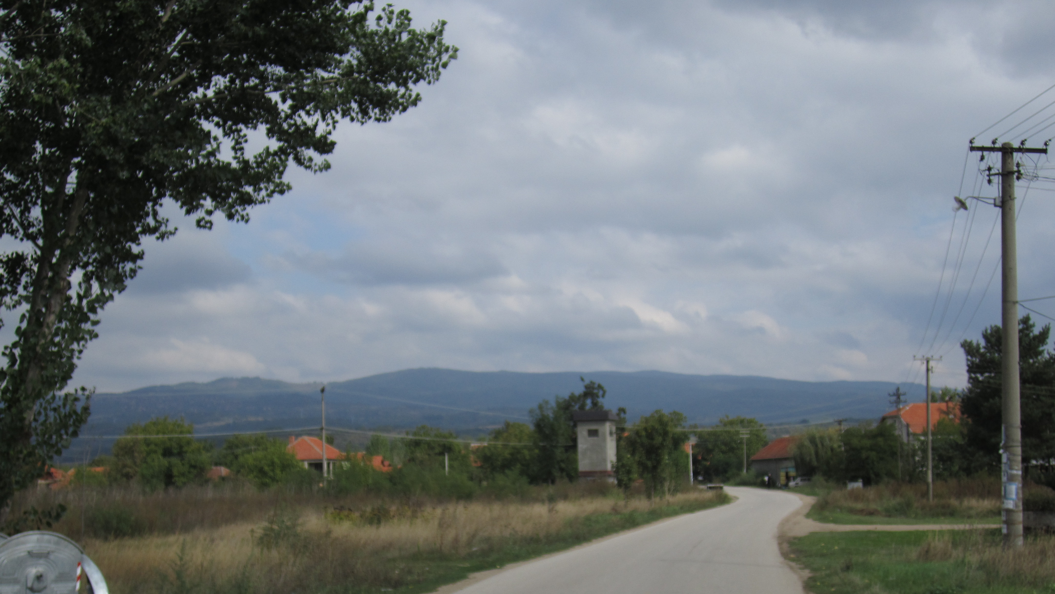 Srpski (latinica): Brejanovce, Leskovac